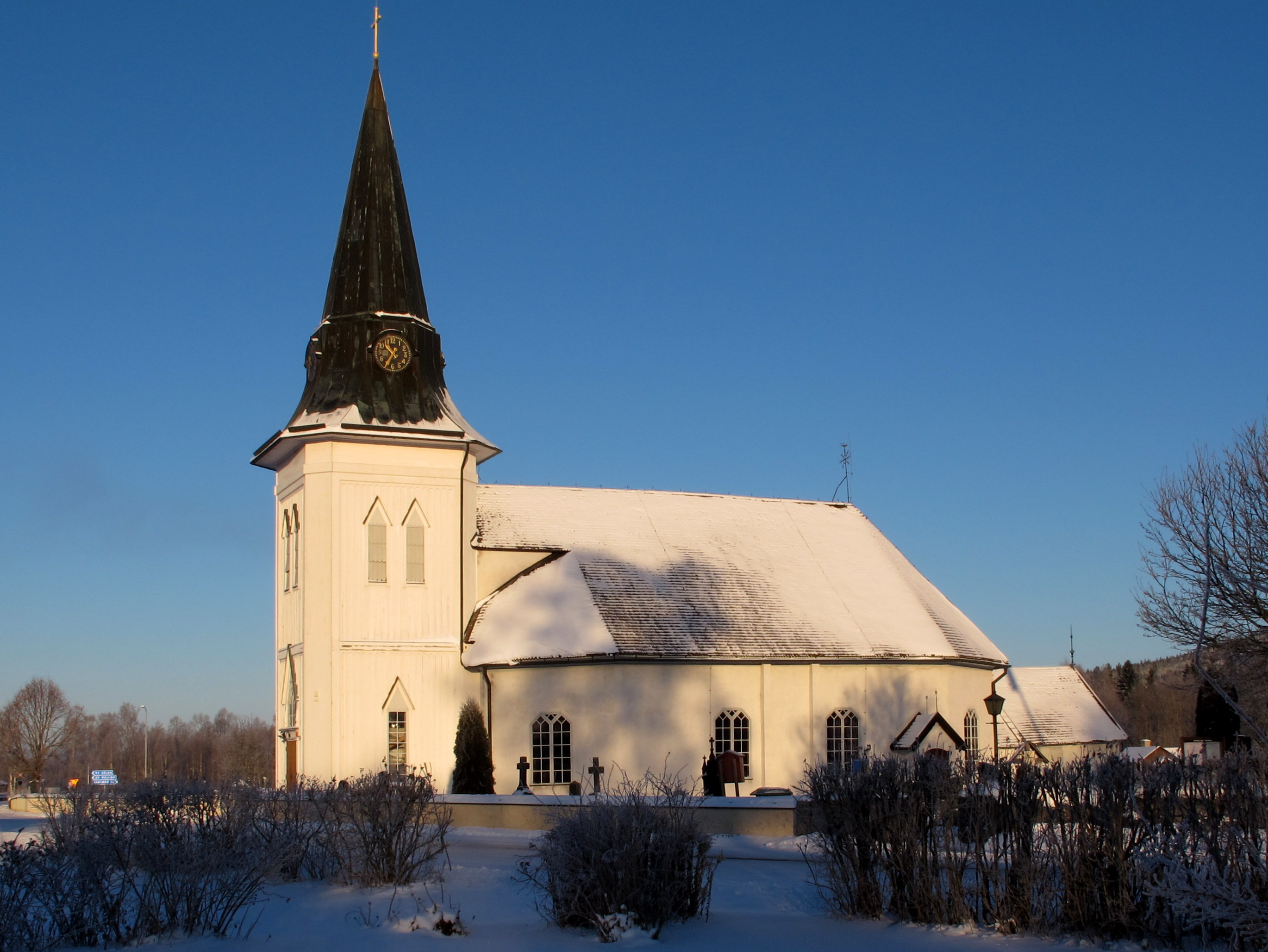 Äppelbo kyrka